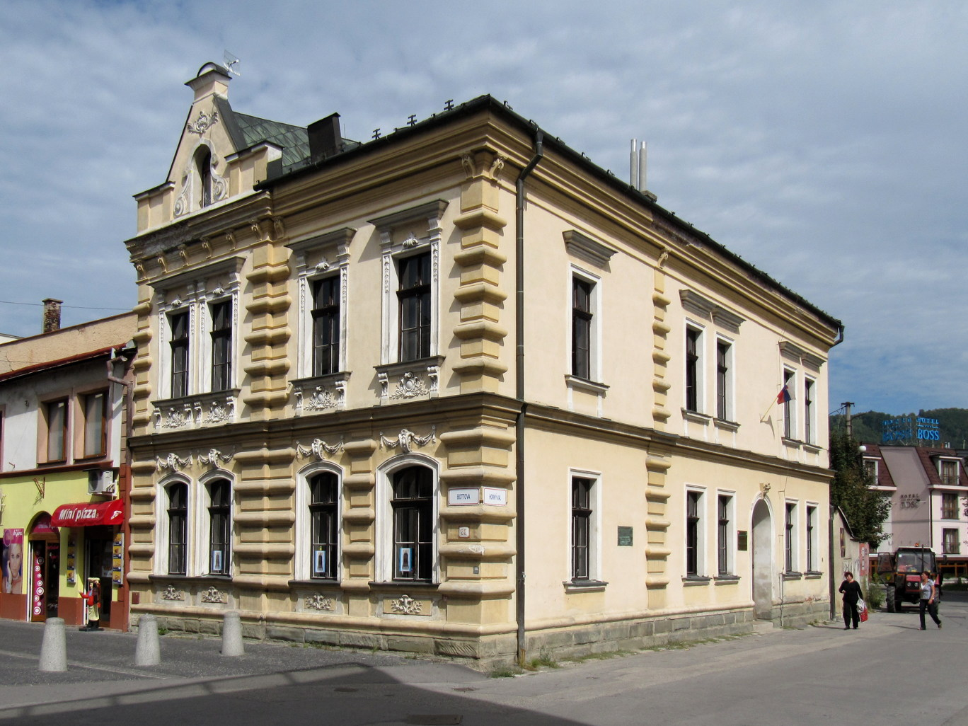 Makovického dom, Žilina, Horný val 20